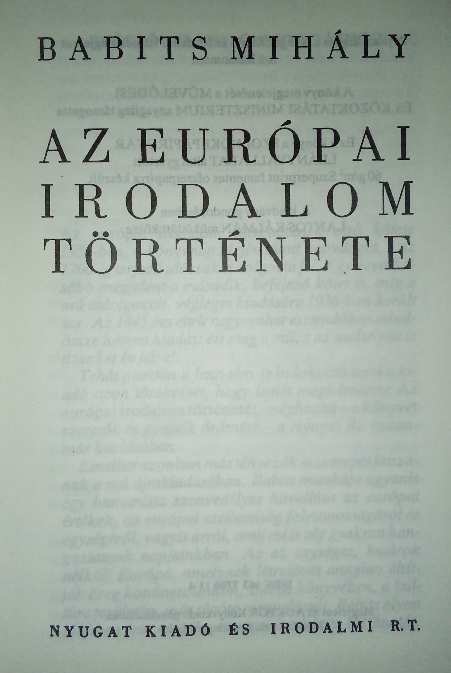 Az adott mű reprint kiadásának címlapja.